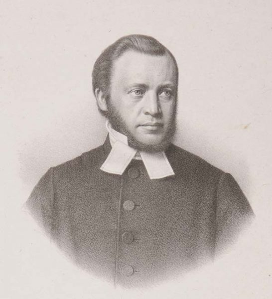 Porträt von Andreas Detlef Jensen Auf Stein gez. v.J.Wittmaack, Kiel., Druck v.W.Loeilott. Berlin; Schleswig-Holsteinische Landesbibliothek - Landesgeschichtliche Sammlung Landesgeschichtliche Sammlung, Inventarnummer: P4-J-5